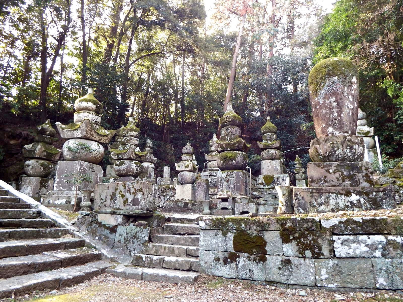 丈六寺ぼ墓石群